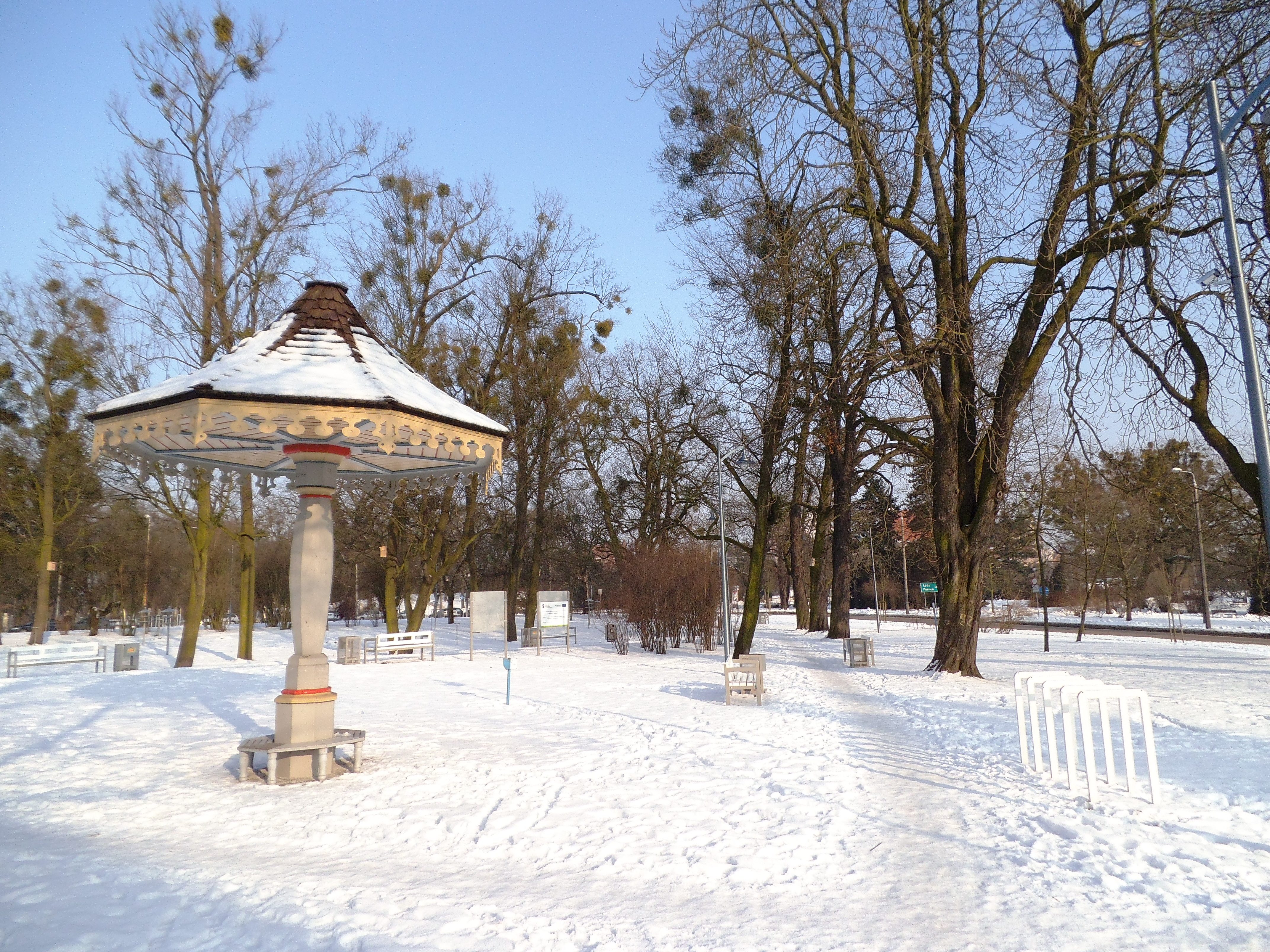 Ogród Muzyków, zima